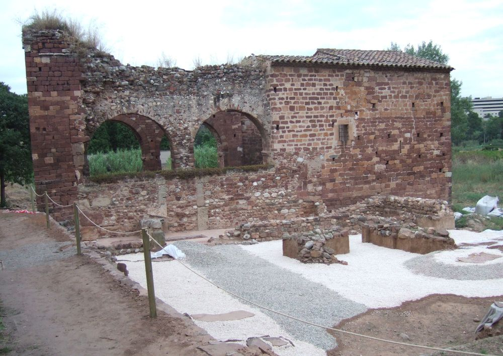 Vista de Santa Margarida de Martorell i del sector excavat al costat de migdia, un cop restaurat.